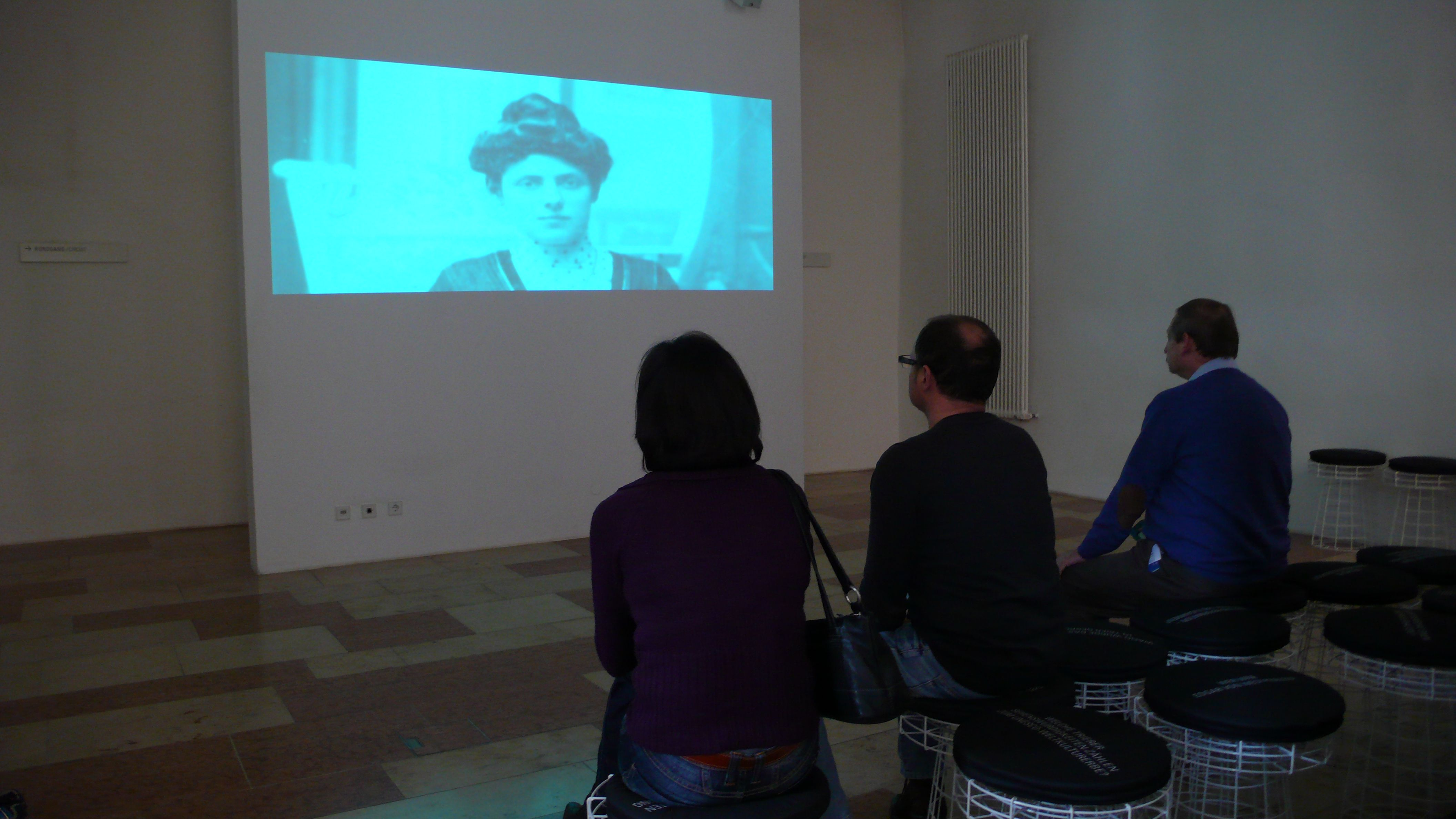 Mehr als 80 Filme können im Trierkino auf Knopfdruck selbst ausgewählt werden.